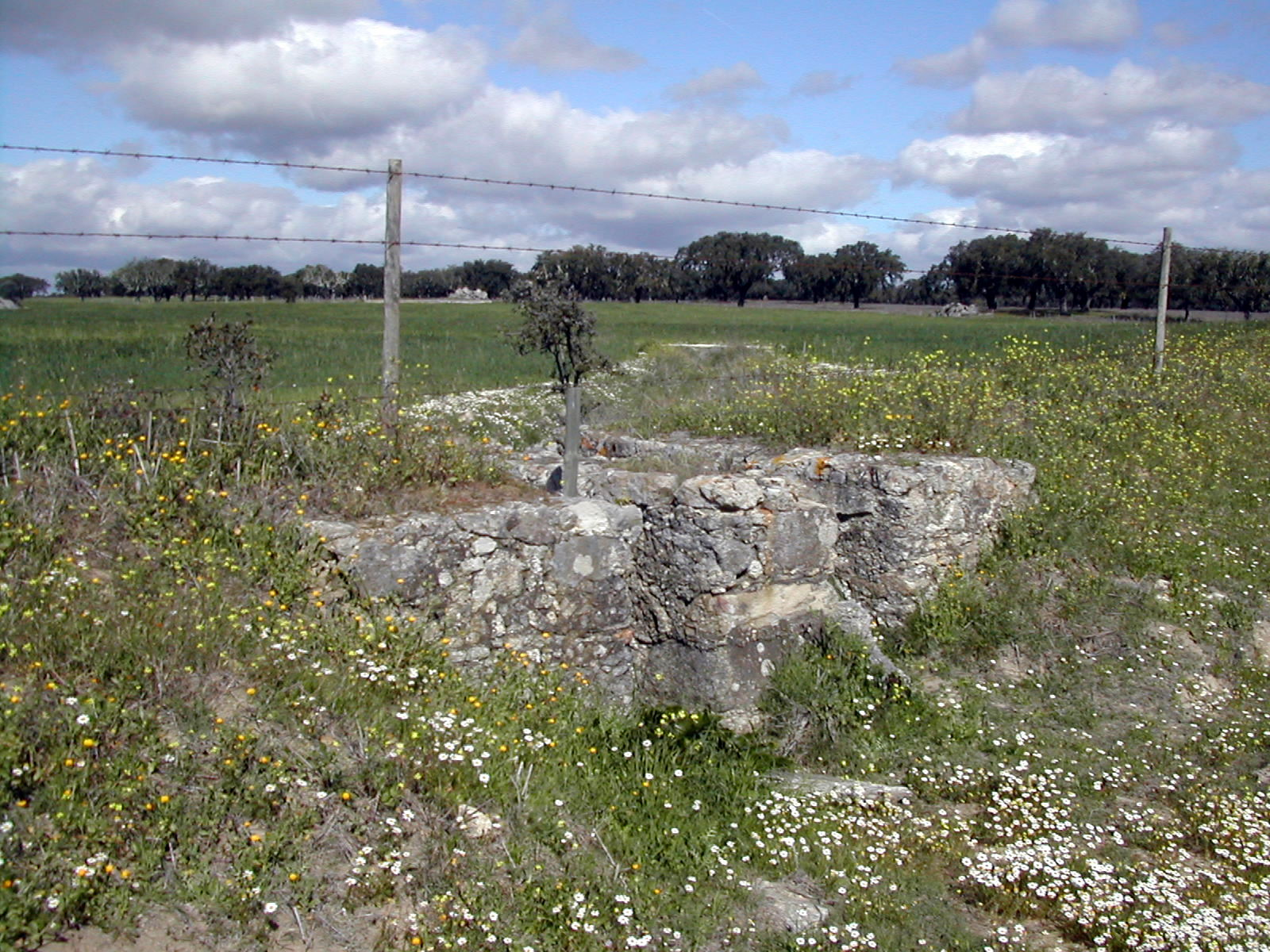 Pontão do antigo ramal ferroviário Casa Branca-Mina da Nogueirinha, Évora, Portugal